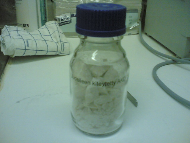 AKD-kiteitä